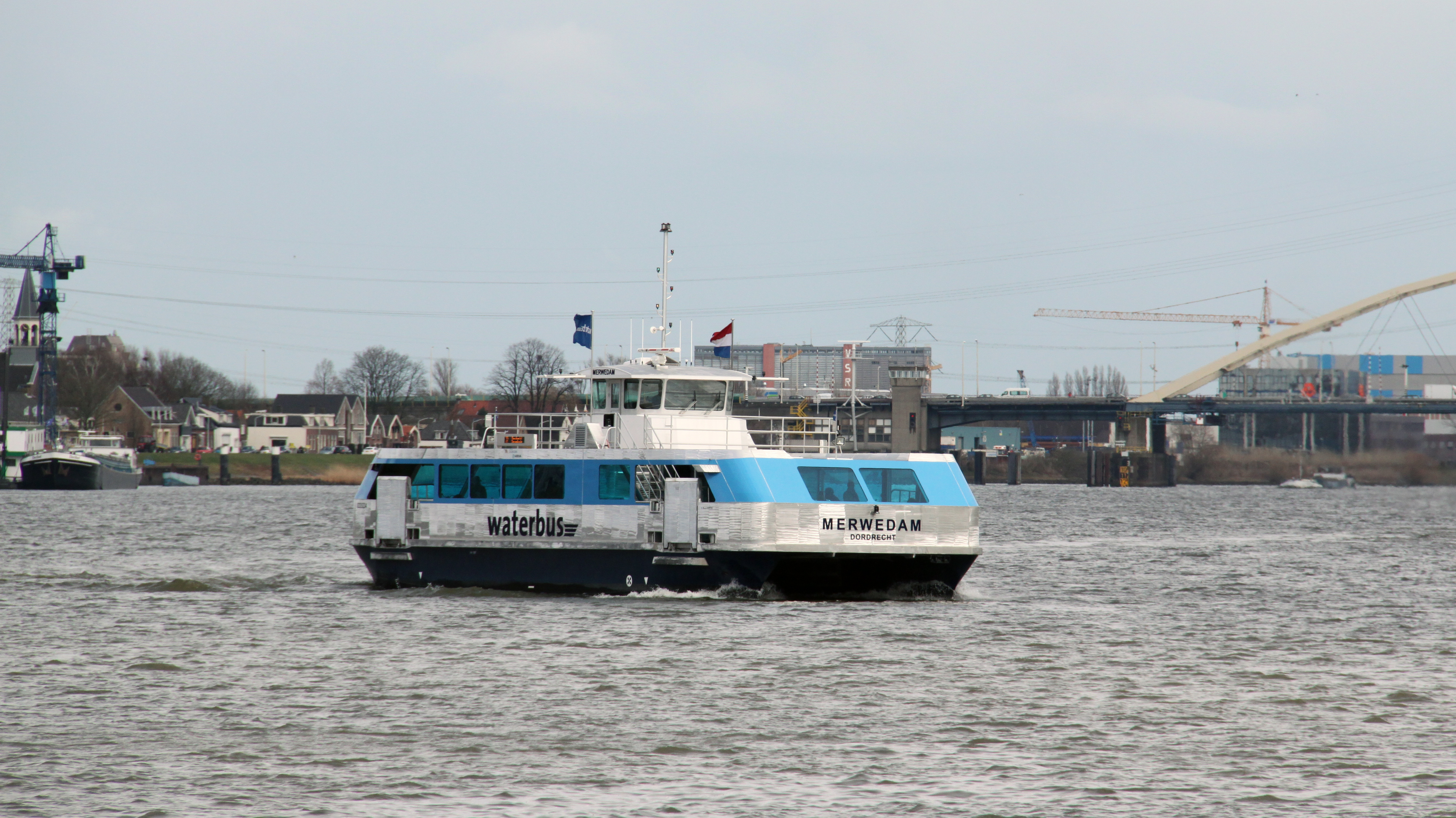 Aankomst van de Merwedam van Waterbus in Dordrecht.